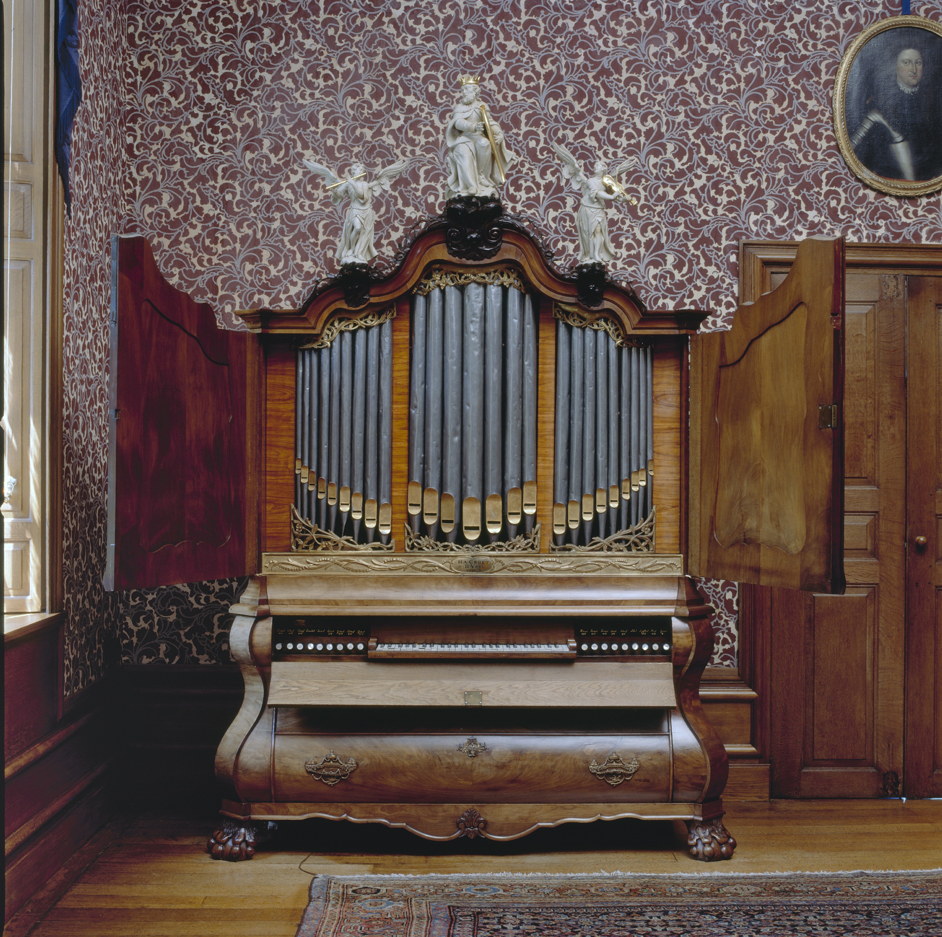 Menkemaborg: Interieur, aanzicht kabinetorgel, orgelnummer 1491 (opmerking: Gefotografeerd voor Het Historische Orgel in Nederland 1769-1790)